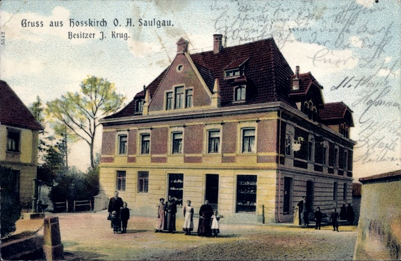 Gruß aus Hosskirch, Ansichtskarte, gelaufen 1904